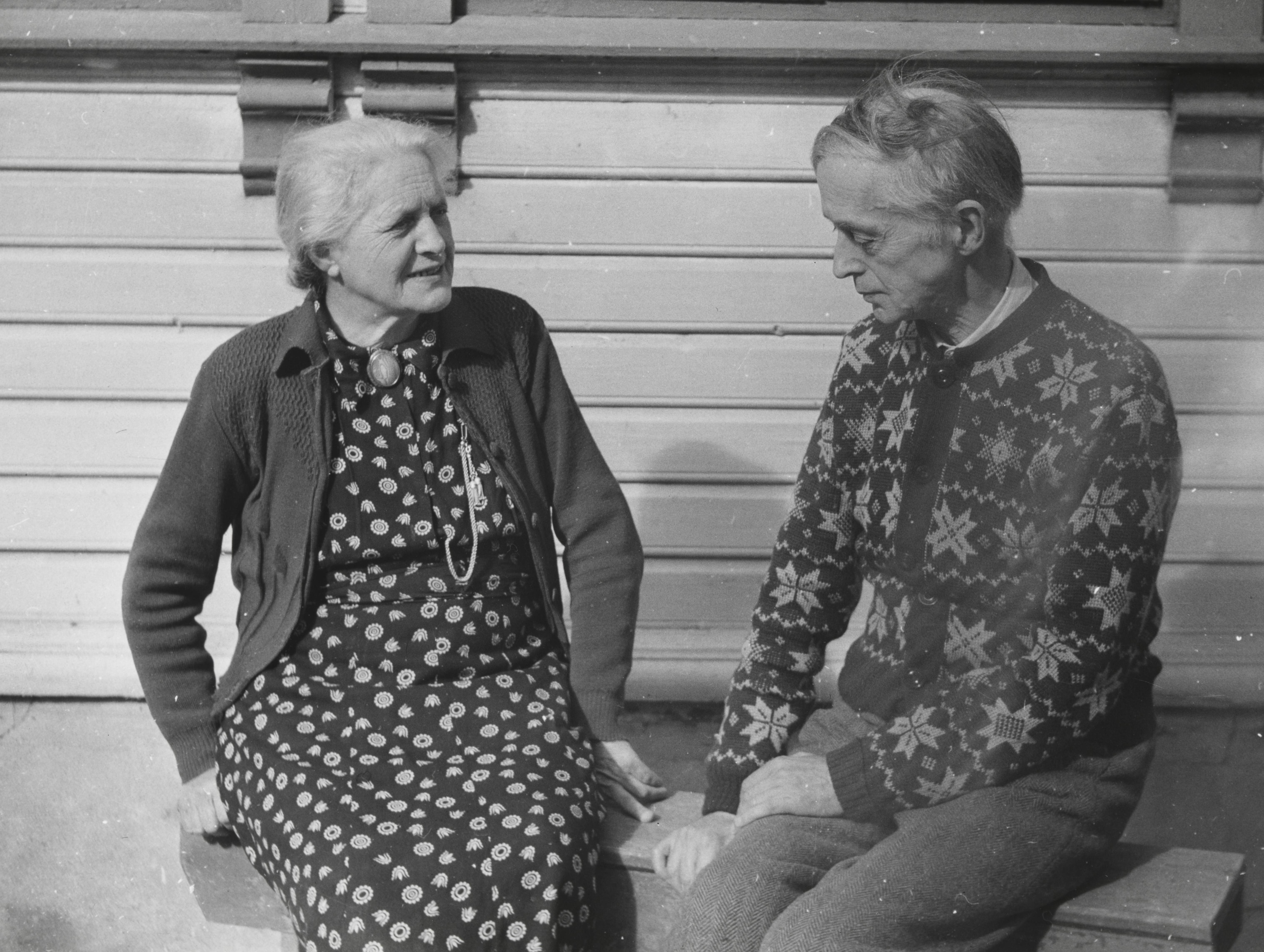 Bildet er hentet fra Nasjonalbibliotekets bildesamling Depicted person: Valen, Fartein